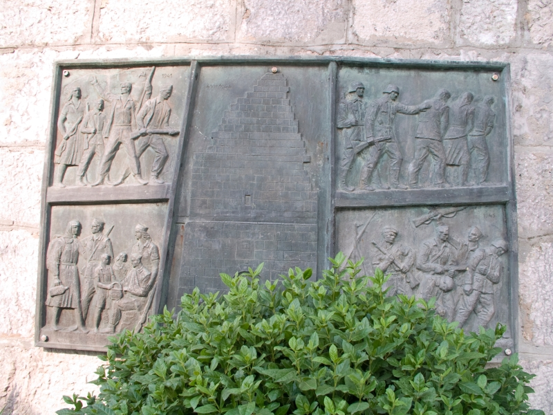 Spomenik na zvoniku crkve Svetog Stjepana u Dobrinju na otoku Krku